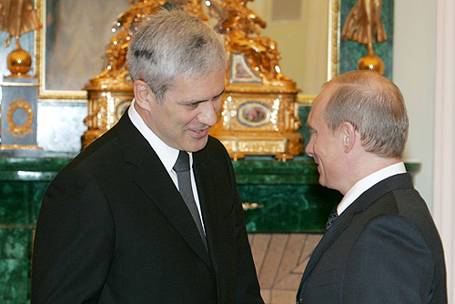 15 ноября 2005 года МОСКВА, КРЕМЛЬ. С Президентом Сербии Борисом Тадичем.